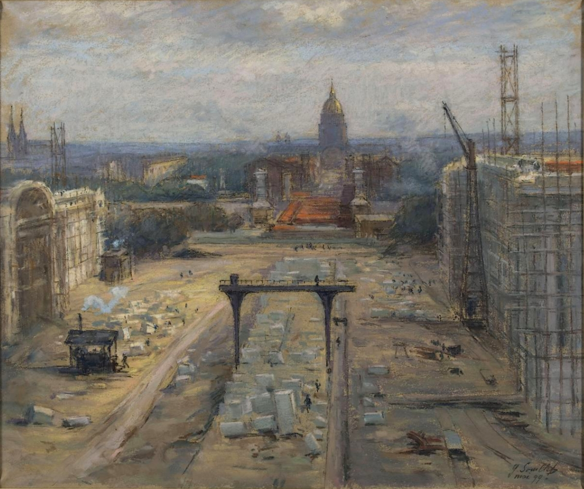 L'avenue Alexandre III, le Grand et le Petit Palais en construction, dessin par Georges Souillet, 1899, 46,8 x 55,5 cm. Musée Carnavalet, Paris, D.4344